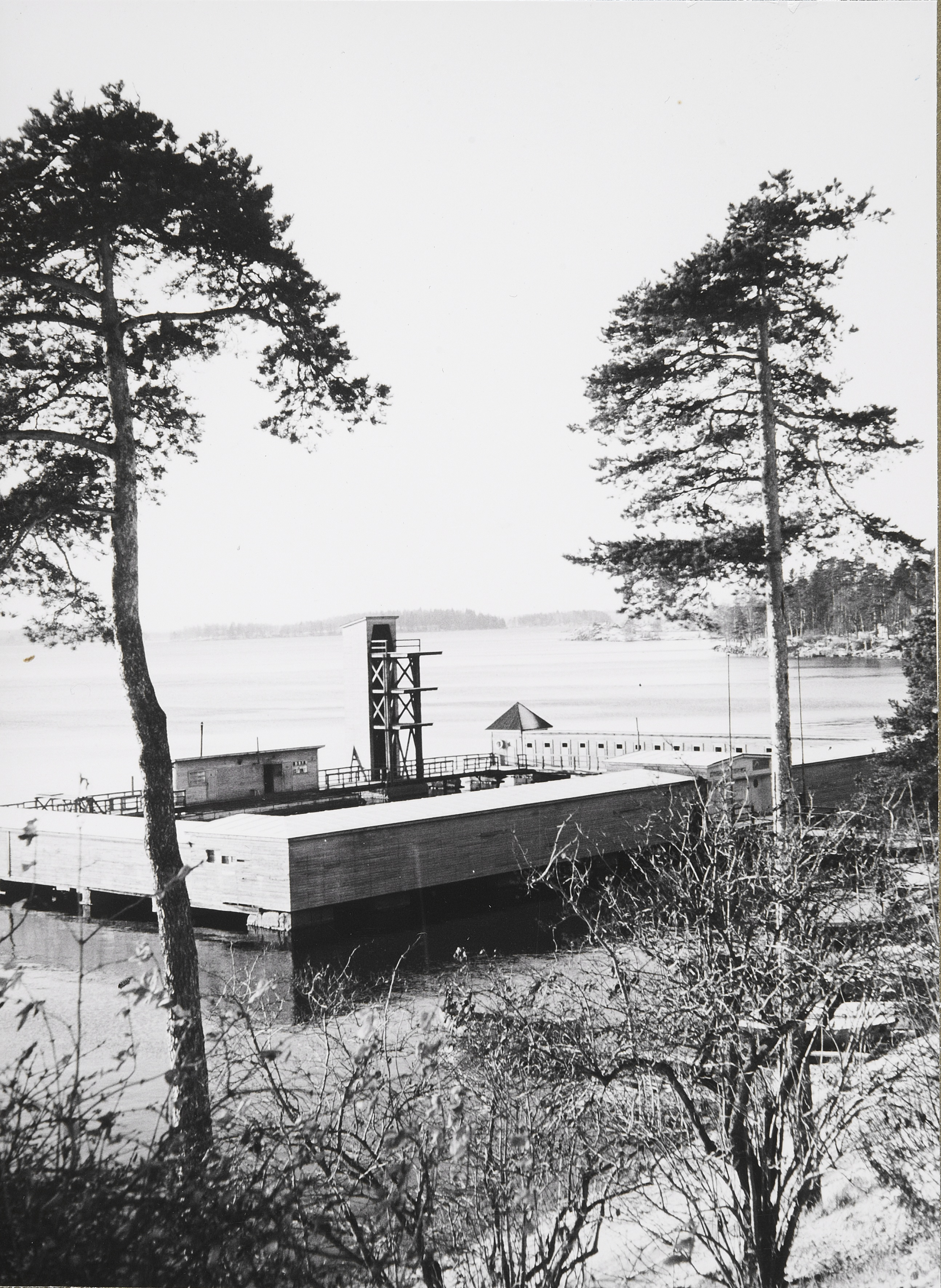 Kuvassa on Palomäen uimalaitos, joka sijaitsi Tampereella Pyhäjärven rannassa 1908–1962. Uimalaitoksen suunnitteli kaupunginarkkitehti Lambert Petterson.